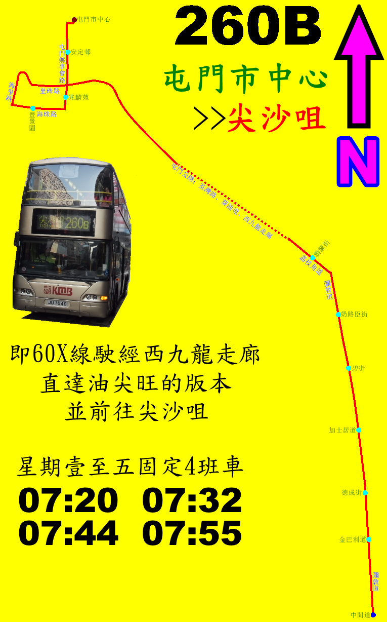 中文（香港）: 九巴260B線的走線圖